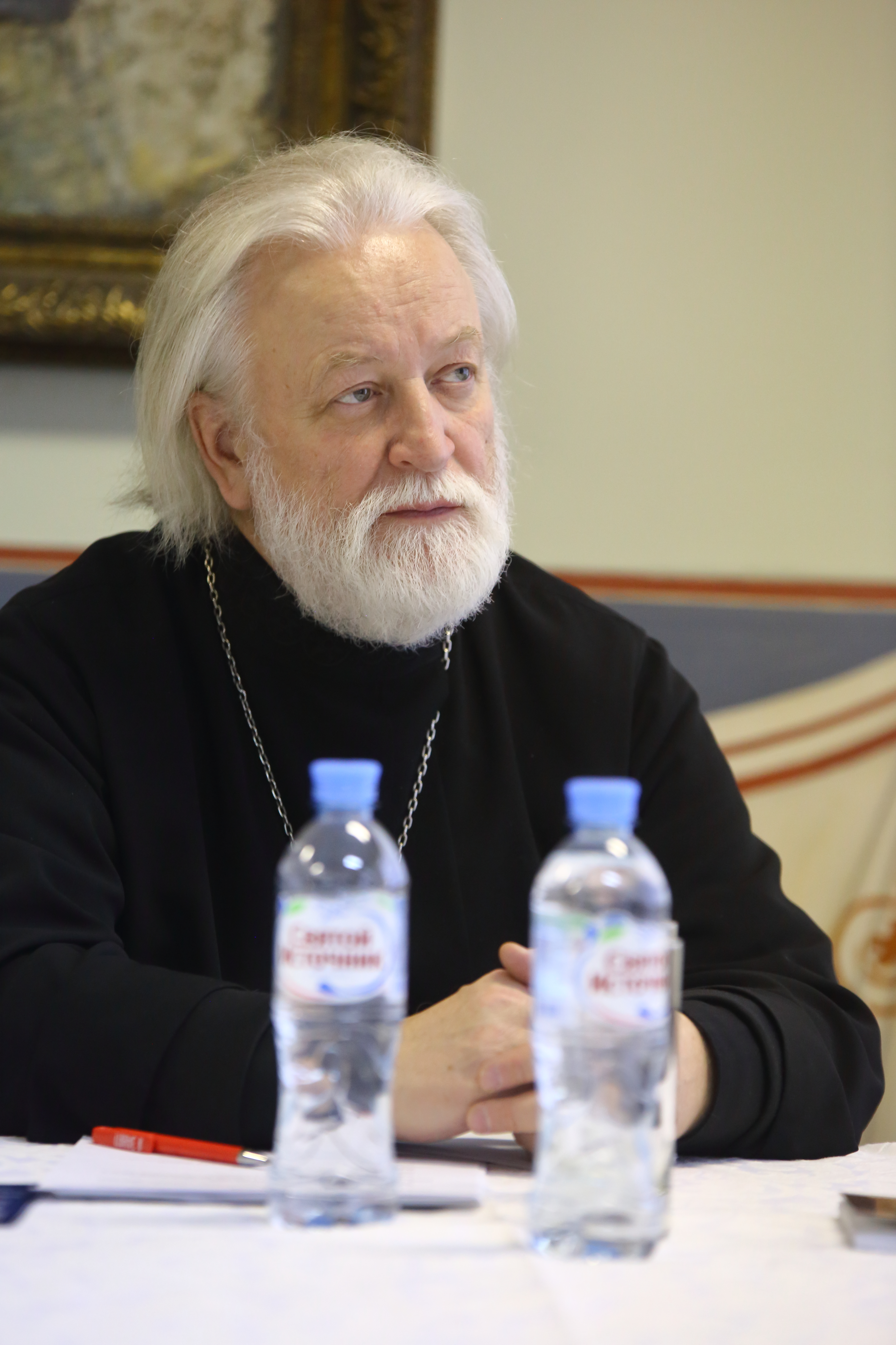 На III Съезде семейных клубов трезвости, Москва, Донской монастырь, 26 января 2019 года